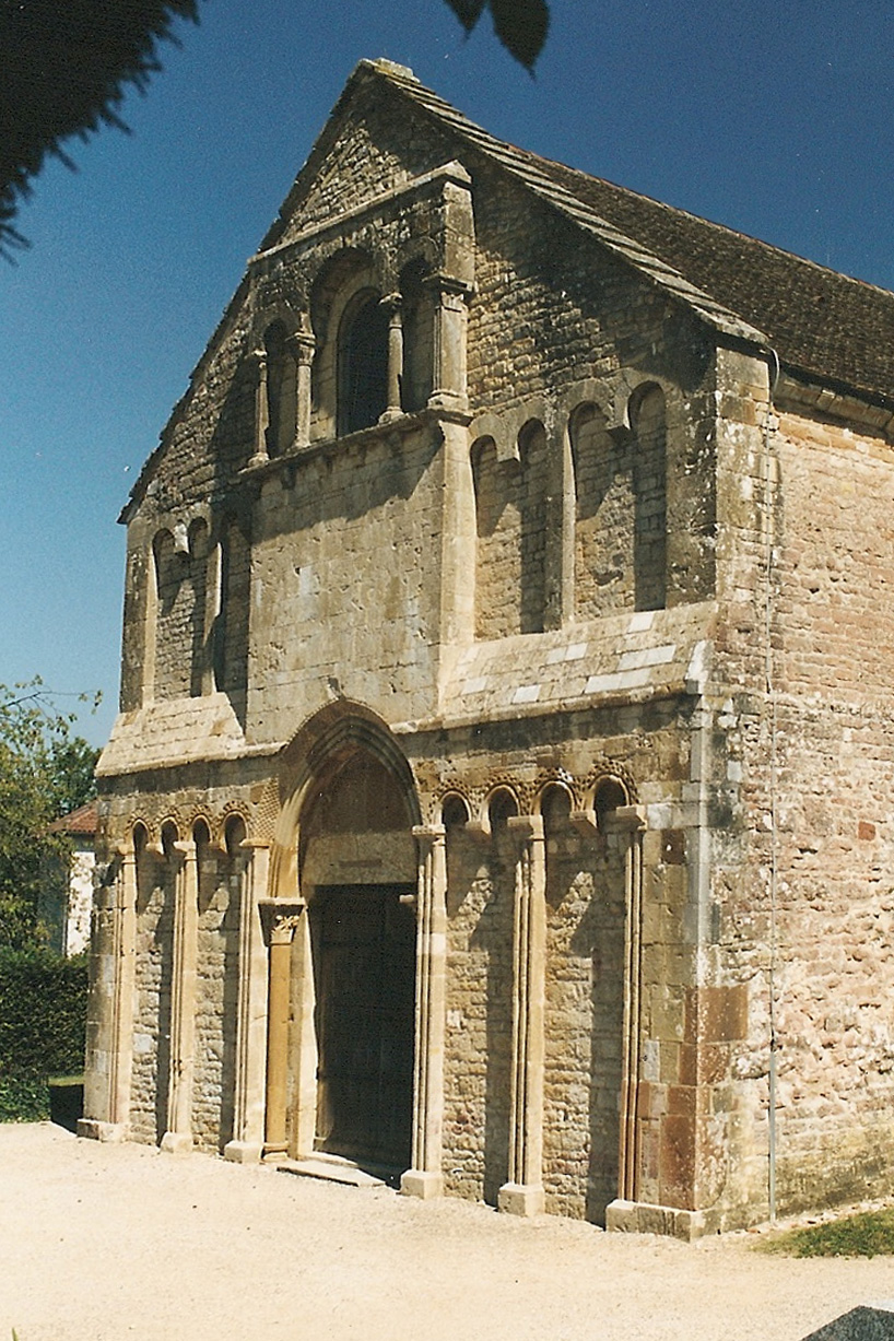 St.-André-de-Bâgé, Fassade von SW